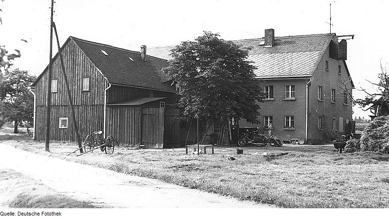 Original image description from the Deutsche FotothekBeiersdorf-Neulauba. Ehem. Windmühlengehöft